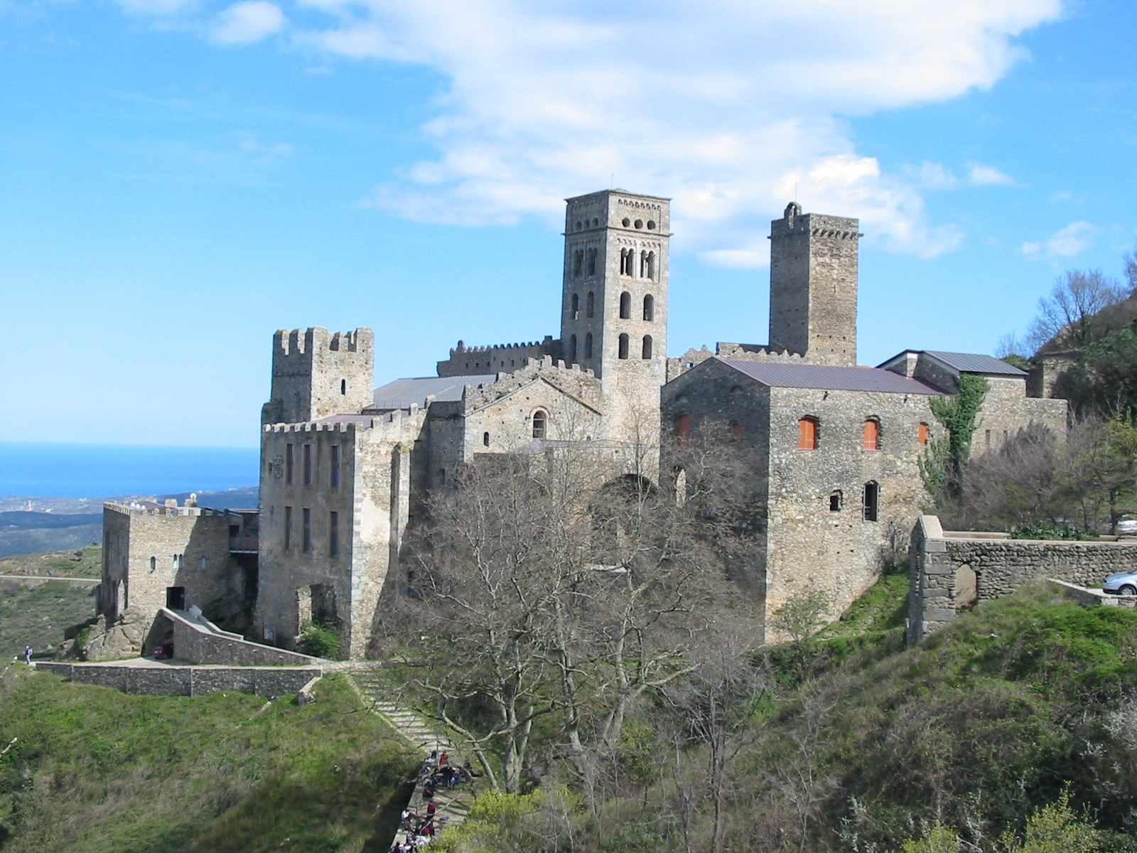 Sant Pere de Rodes, Costa Brava, Catalonia: Remnants of abbey